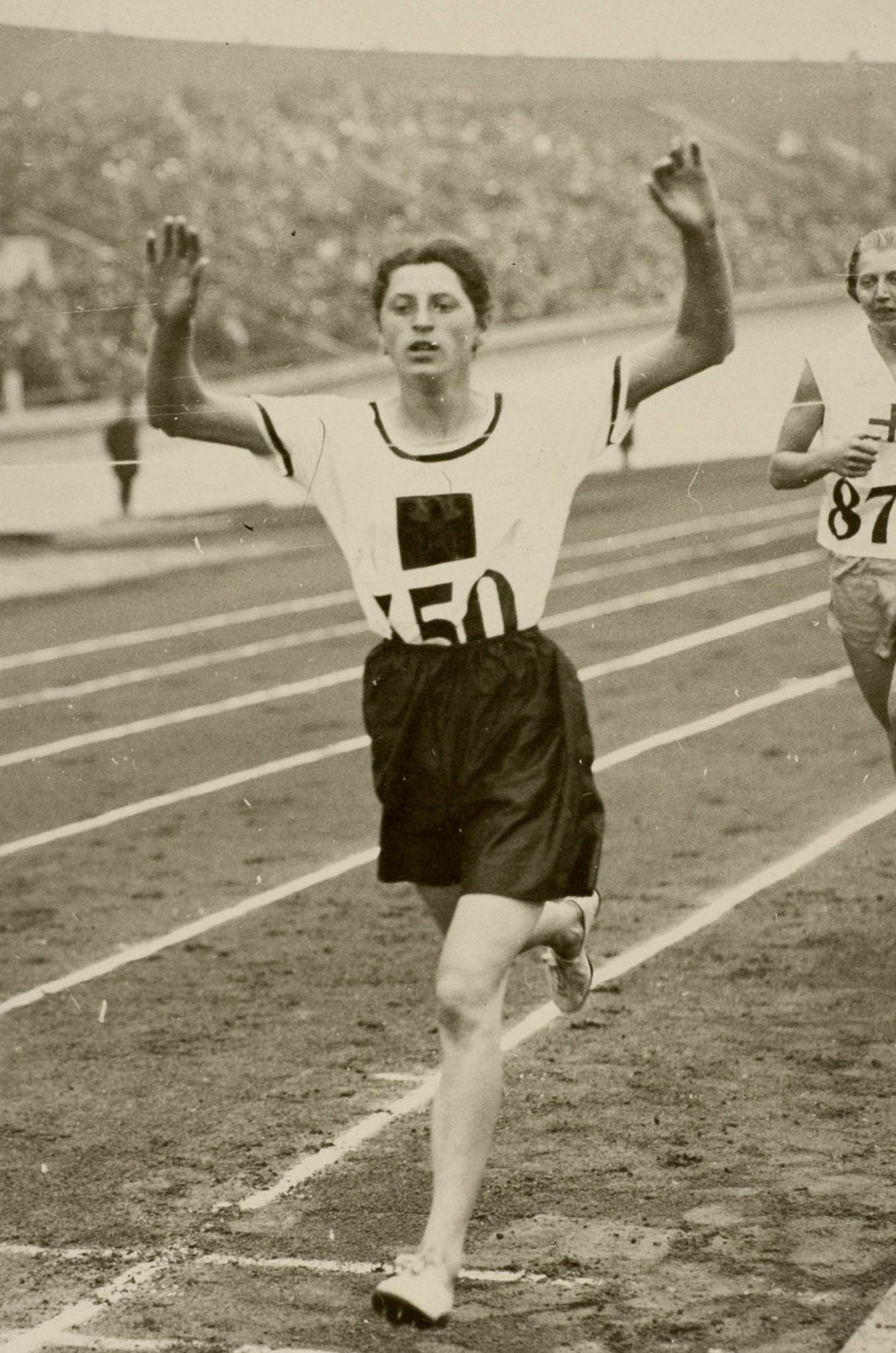 Sport. Sport, Olympische Spelen Amsterdam, 1928 : De duitse athlete Marie Dollinger wint een serie van de 800 meter hardlopen (vrouwen).